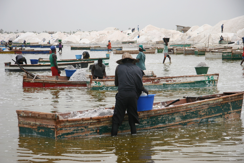 Récolte du sel au Lac rose, Sénégal